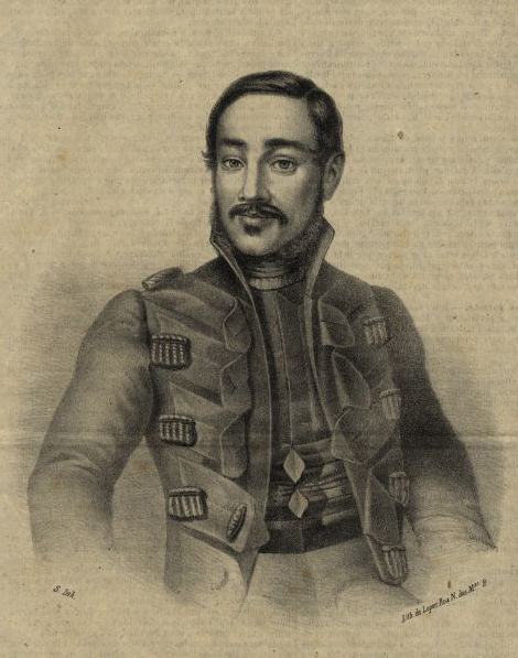 Luís da Silva Mouzinho de Albuquerque, engenharia, poeta, cientista e político português.